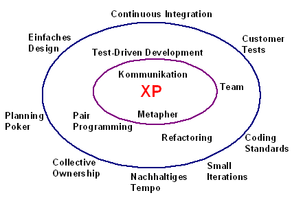 XP-kreis